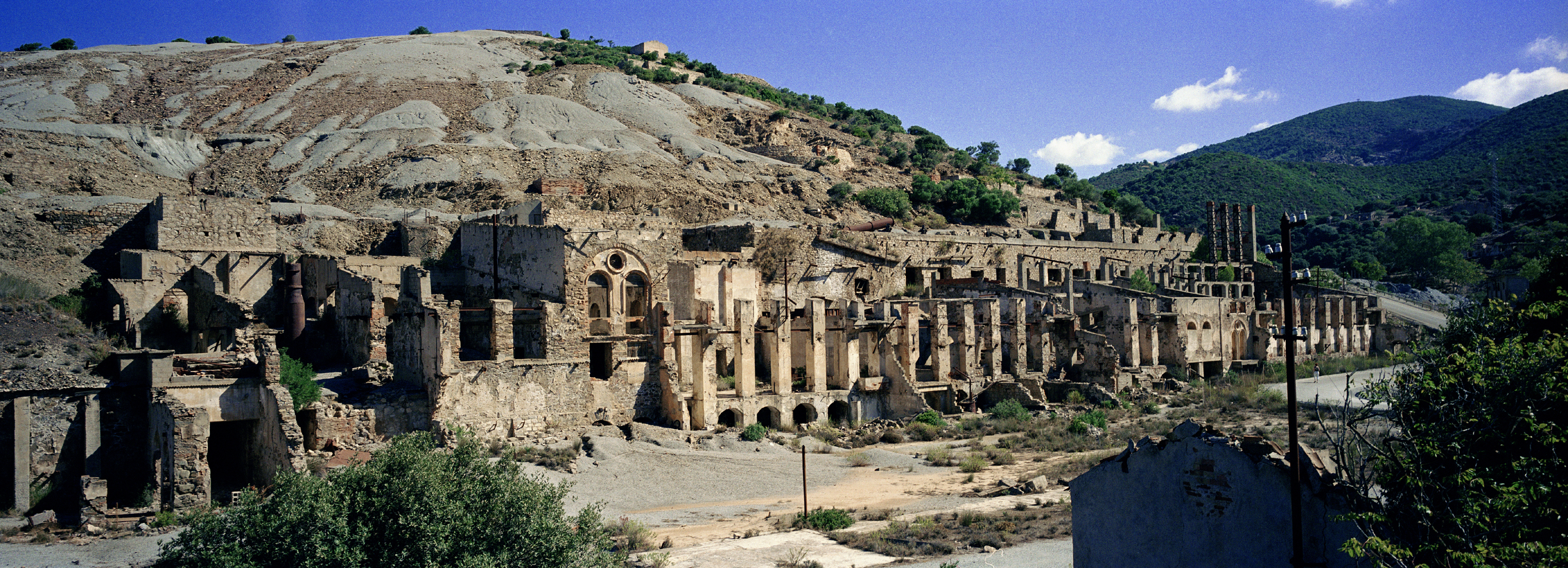 Laveria Brassey, Naracauli, Ingurtosu mine. Sardinia, Italy.